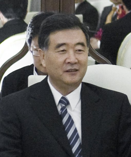 Mr. Wang Yang เลขาธิการพรรคคอมมิวนิสต์มณฑลกวางตุ้ง เข้าเยี่ยมคารวะนายกรัฐมนตรี ณ ห้องสีงาช้าง ตึกไทยคู่ฟ้า ทำเนียบรัฐบาล 9พฤศจิกายน2552 (The Official Site of The Prime Minister of Thailand Photo by พีรพัฒน์ วิมลรังครัตน์)